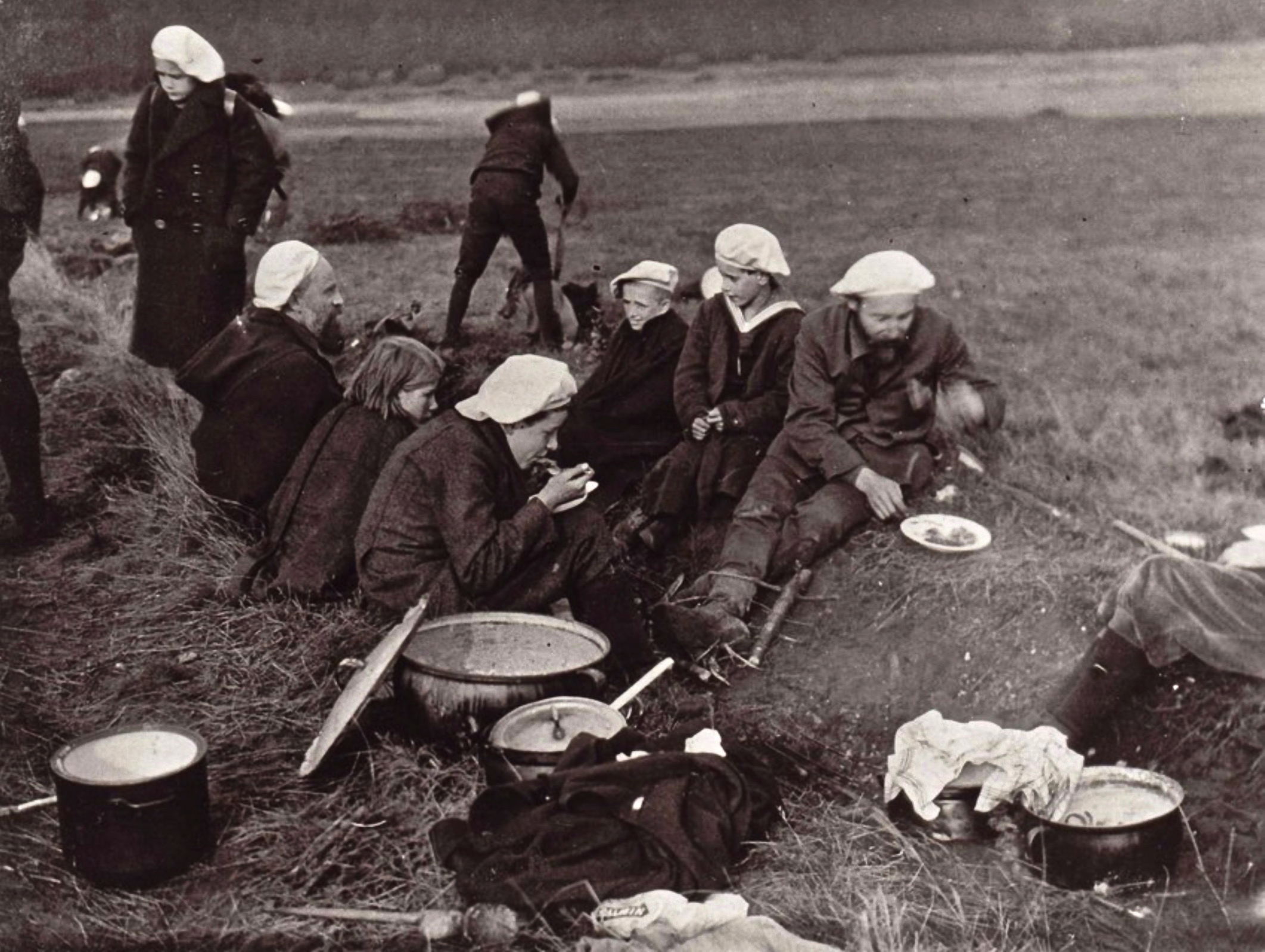 Erster Freideutscher Jugendtag 1913 auf dem Hohen Meißner: Gustav Wyneken (1875–1964), links, mit Vollbart, und Schulleiter Martin Luserke (1880–1968), rechts, mit Vollbart, zusammen mit Schülern des reformpädagogischen Landerziehungsheims Freie Schulgemeinde aus Wickersdorf bei Saalfeld im Thüringer Wald. Zu dem Anlass waren sämtliche rund einhundert Schüler des Internats mit ihren Lehrern angereist.